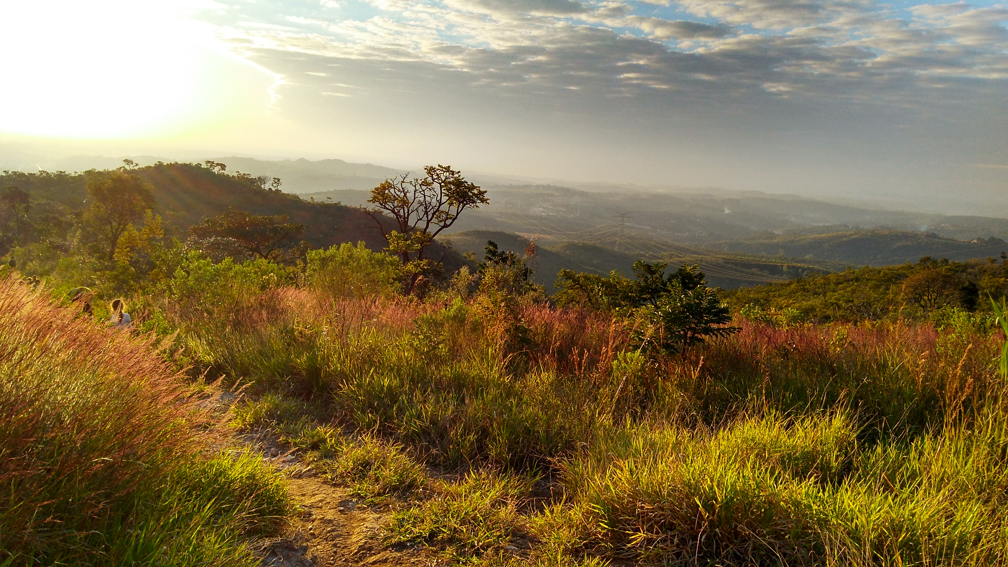 Foto registrada no alto de uma montanha na Cidade de Alumínio - SP. Grupo de trilha